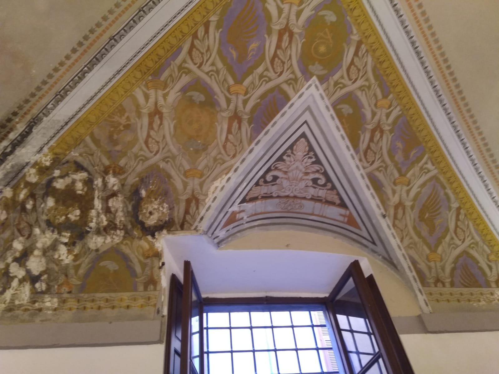 Affresco originale in quella che era la stalla